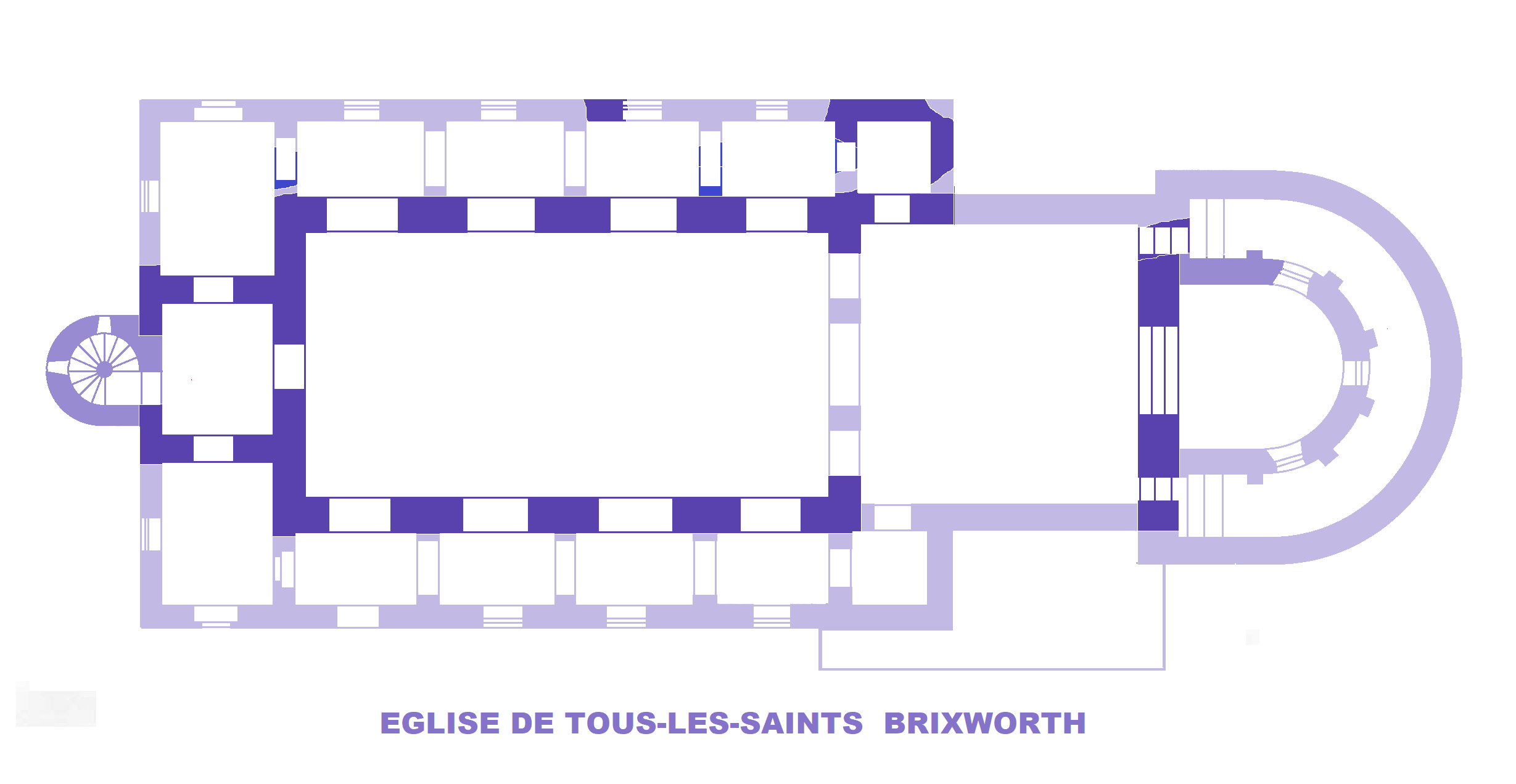 Eglise de Tous-les-Saint, Brixworth, Plan